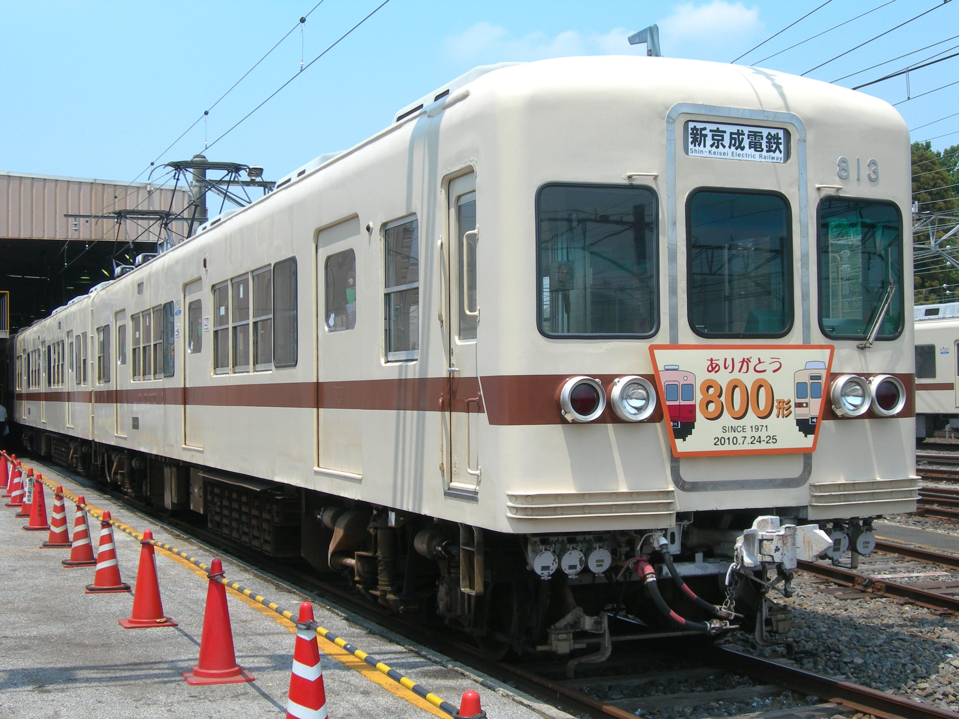 新京成電鉄800形電車さよなら運転